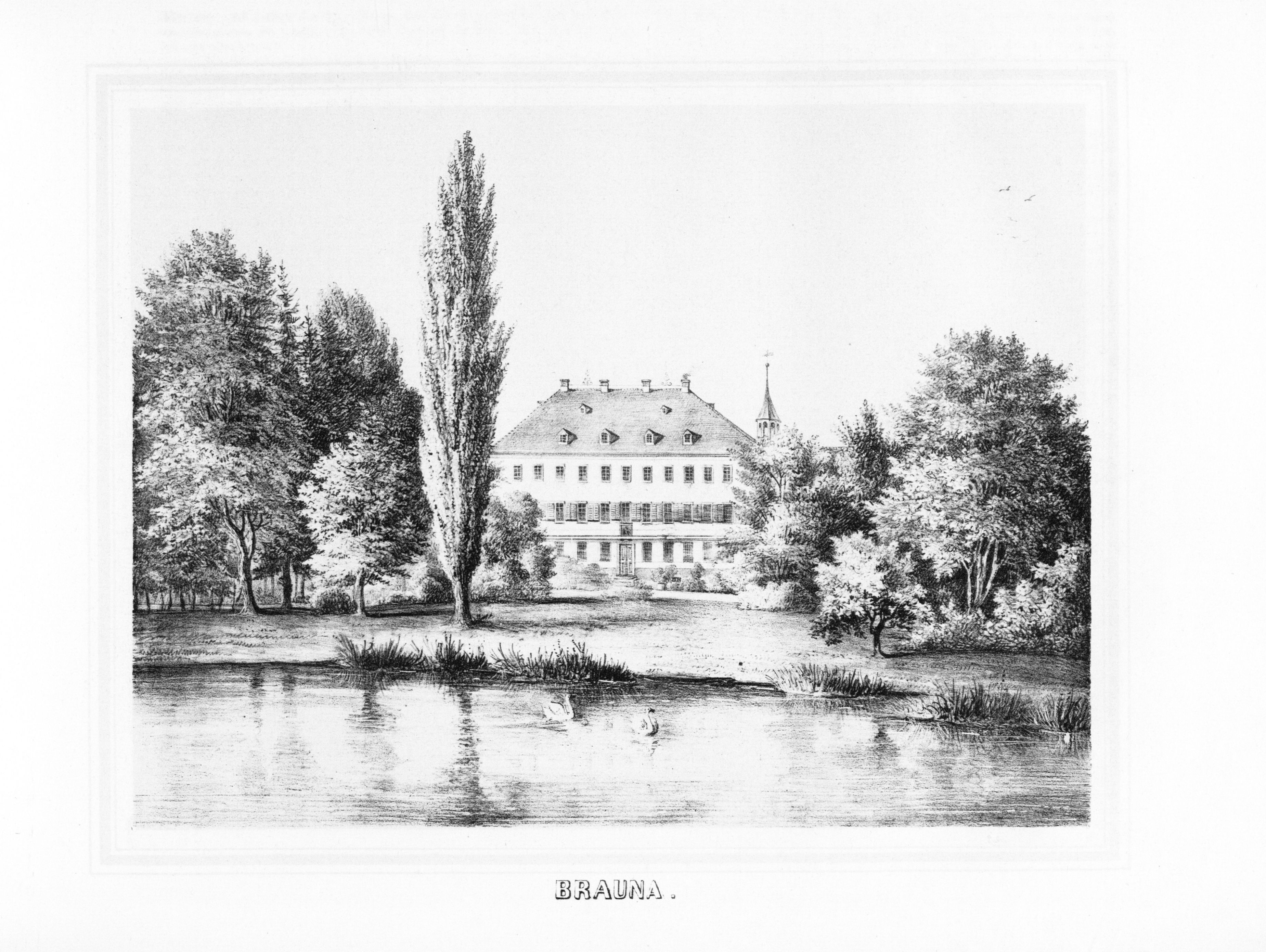 Brauna aus: Album der Rittergüter und Schlösser im Königreiche Sachsen Markgrafenthum Oberlausitz Section: III